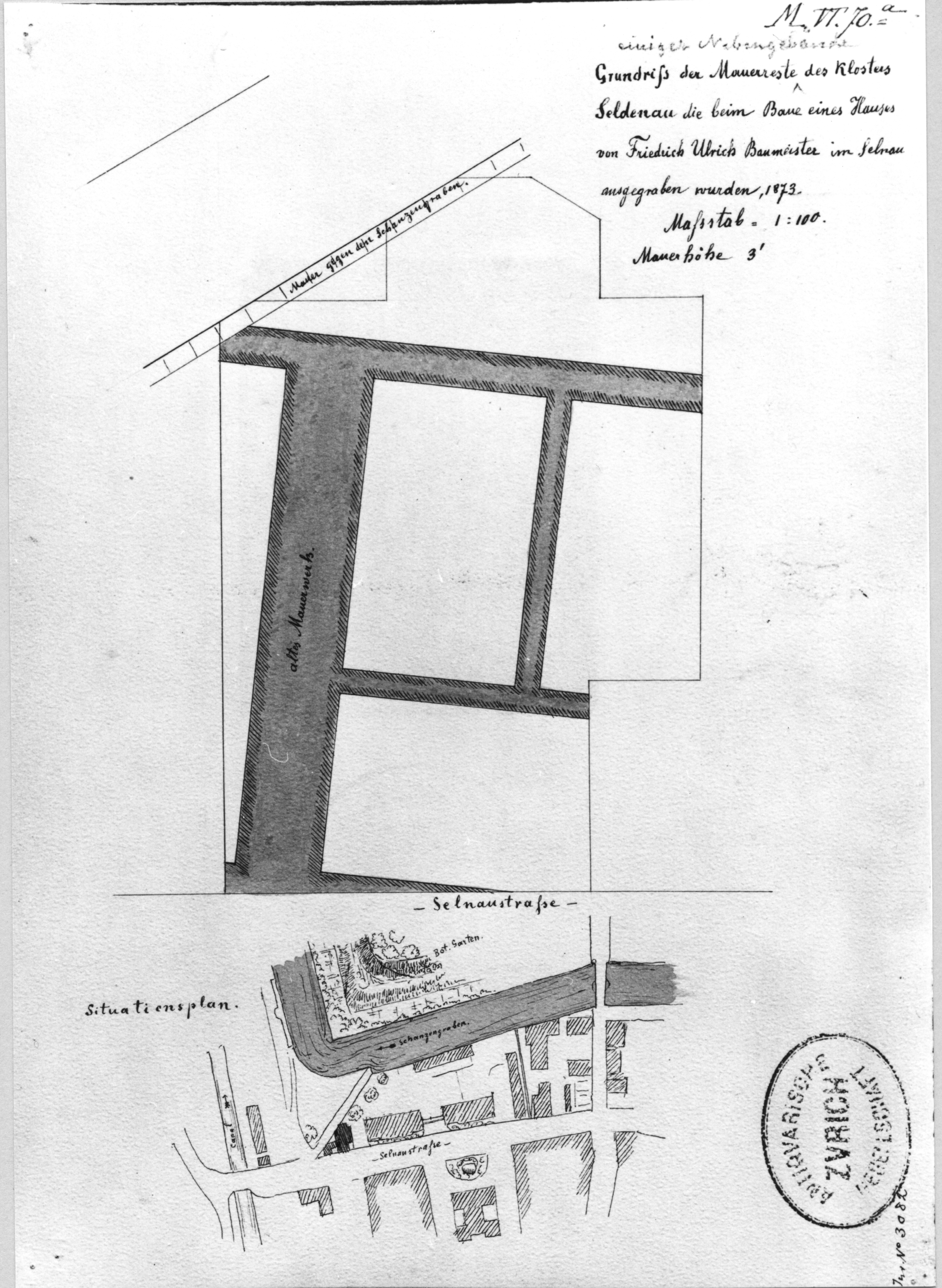 Kloster Selnau Zürich, Schweiz, Mauerreste 1873